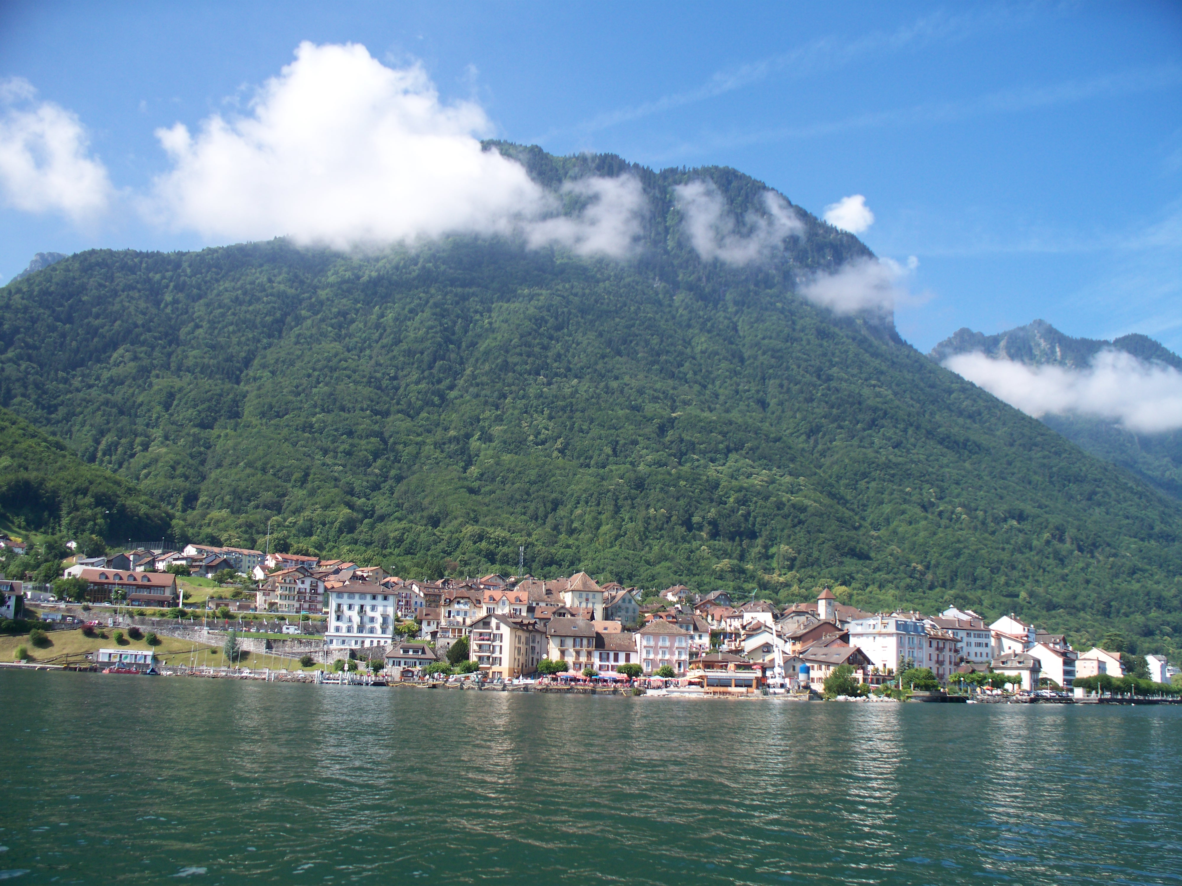 Vue du village de St-Gingolph depuis le lac Léman